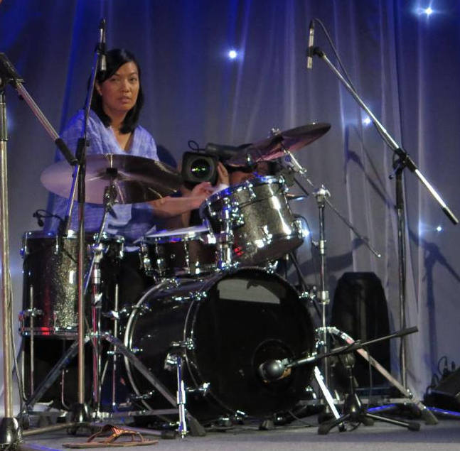 Meklit Hadero and Susie Ibarra